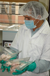 Actividad en un Centro de Investigacion de la Universidad Tecnologica de Panama